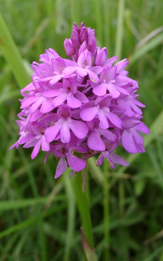 Photo by Ramin Nakisa